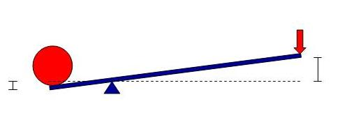 Hefboom.